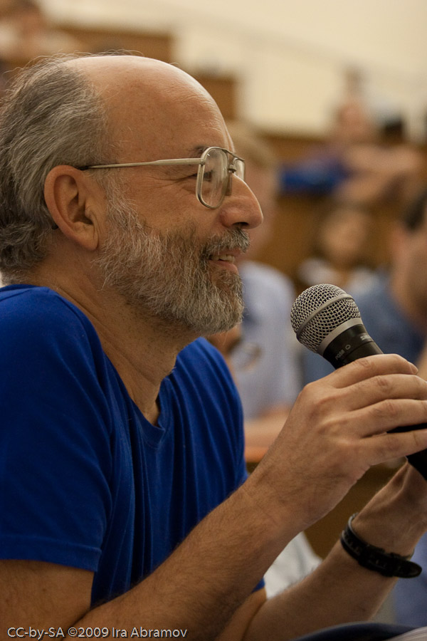 AntiBiometrics-7978